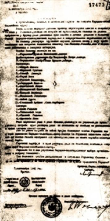 Srpskohrvatski / српскохрватски: Odluka NOO Krupanj od 2. septembra 1941. o organizovanju bolnice i Sanitetske službe "radi ukazivanja prve pomoći i liječenju ranjenih i bolesnih boraca narodnooslobodilačkih odreda kao i neprijateljskih vojnika".